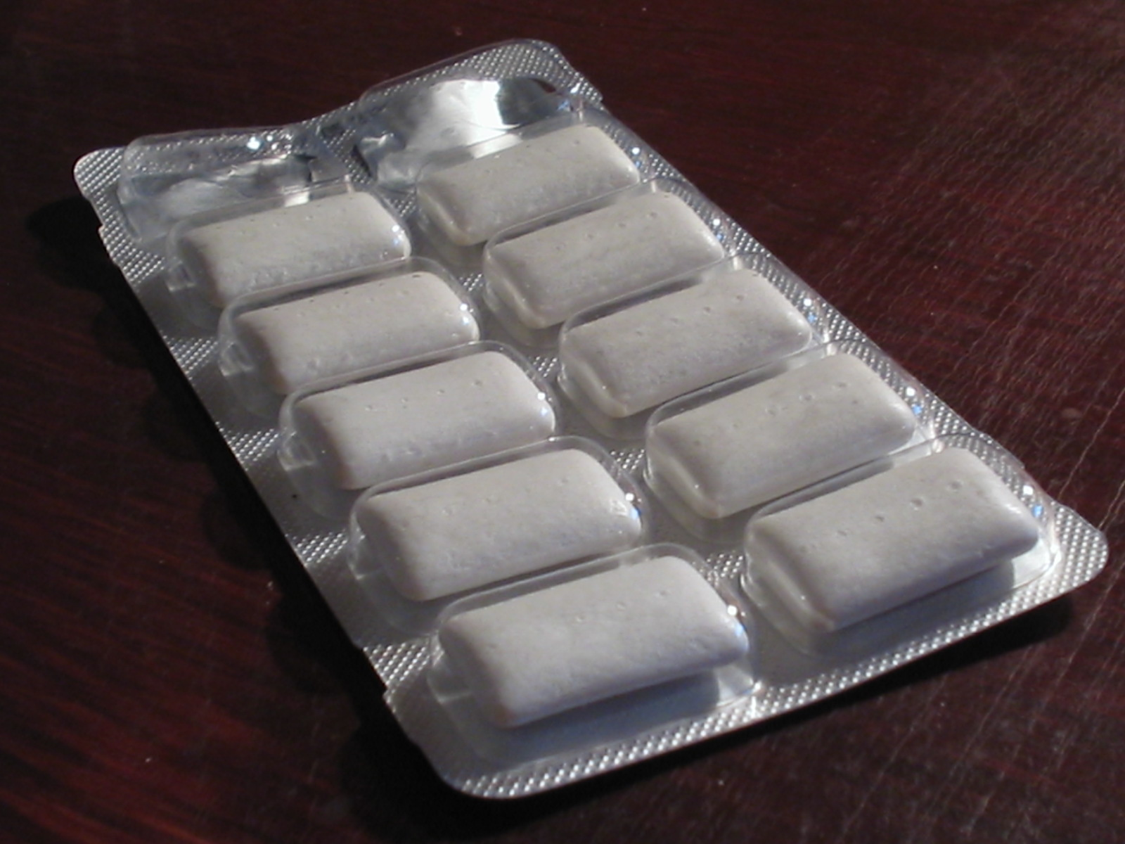 Kauwgom in verpakking